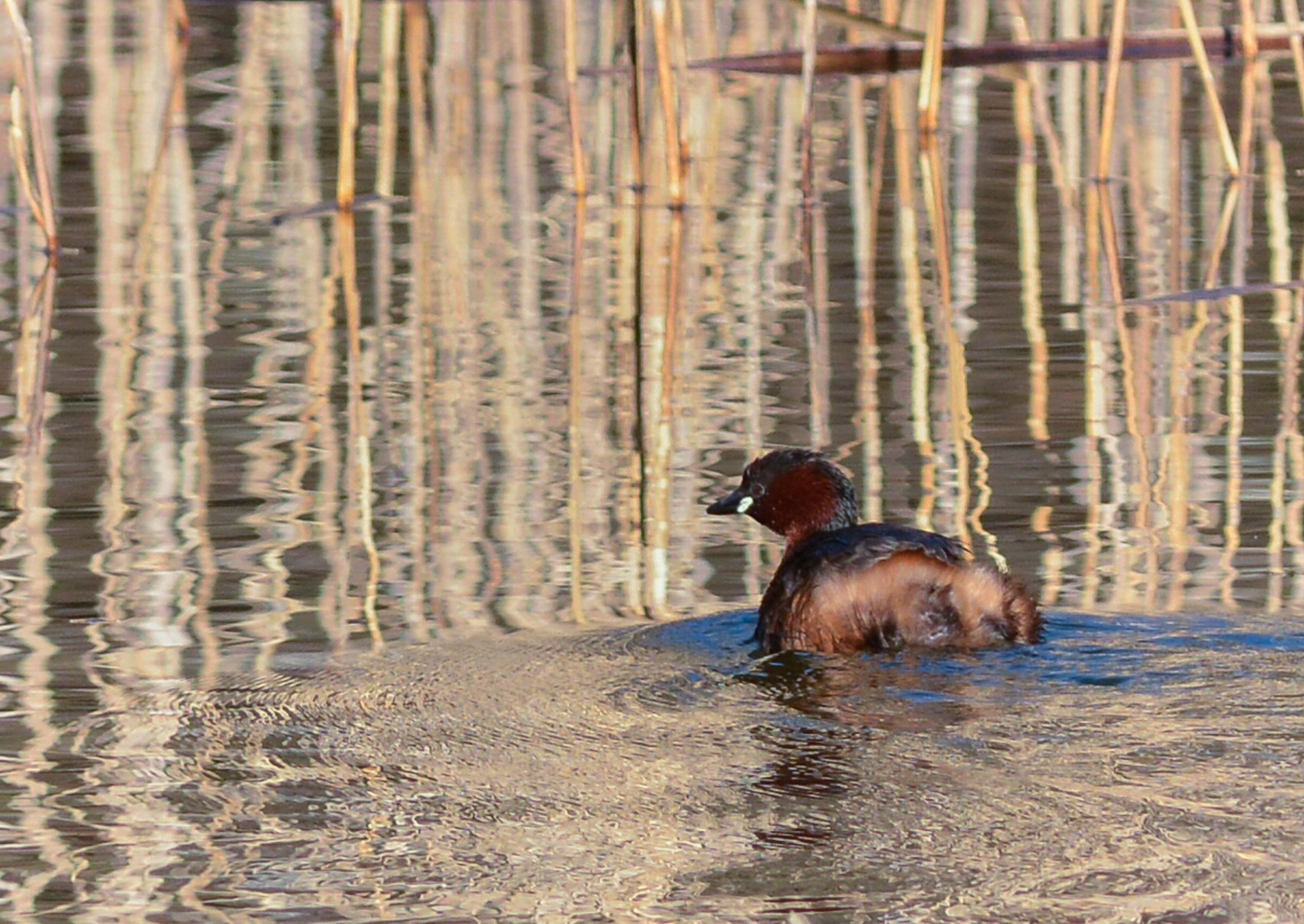 Tuffetto (Tachybaptus ruficollis) presso il lago di Ospedaletto (lago Minisini) Ospedaletto Gemona del Friuli